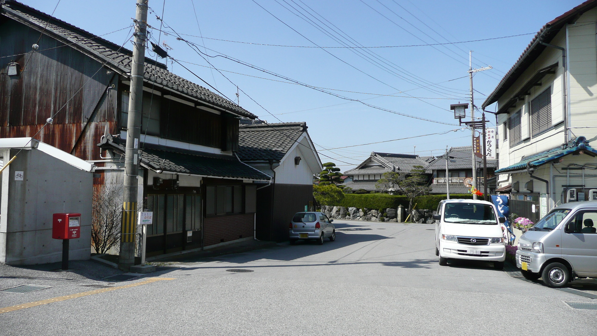 Ohmi Railway, TakaMiya Station plaza.